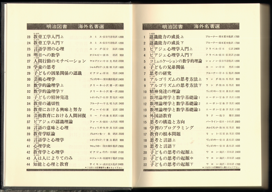 Разворот с оглавлением книги/ Б. Д. Парыгин Основы социально-психологической теории. Издание на японском языке. Токио: Мэйдзи Тосё, 281 с.